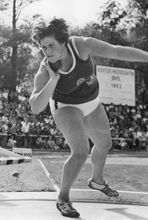 Renate Garisch Zentralbild Kohls tre 01.09.1963 XIV. Deutsche Leichtathletik-Meisterschaften in Jena (30.08.- 01.09.1963) . UBz: Renate Garisch (SC Empor Rostock) verteidigte ihren Meistertitel erfolgreich. 17,32 m konnten die Kampfrichter für die Meisterin messen.